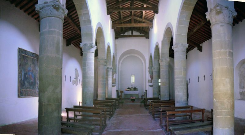 Pieve di Santa Maria alla Sovara, Anghiari